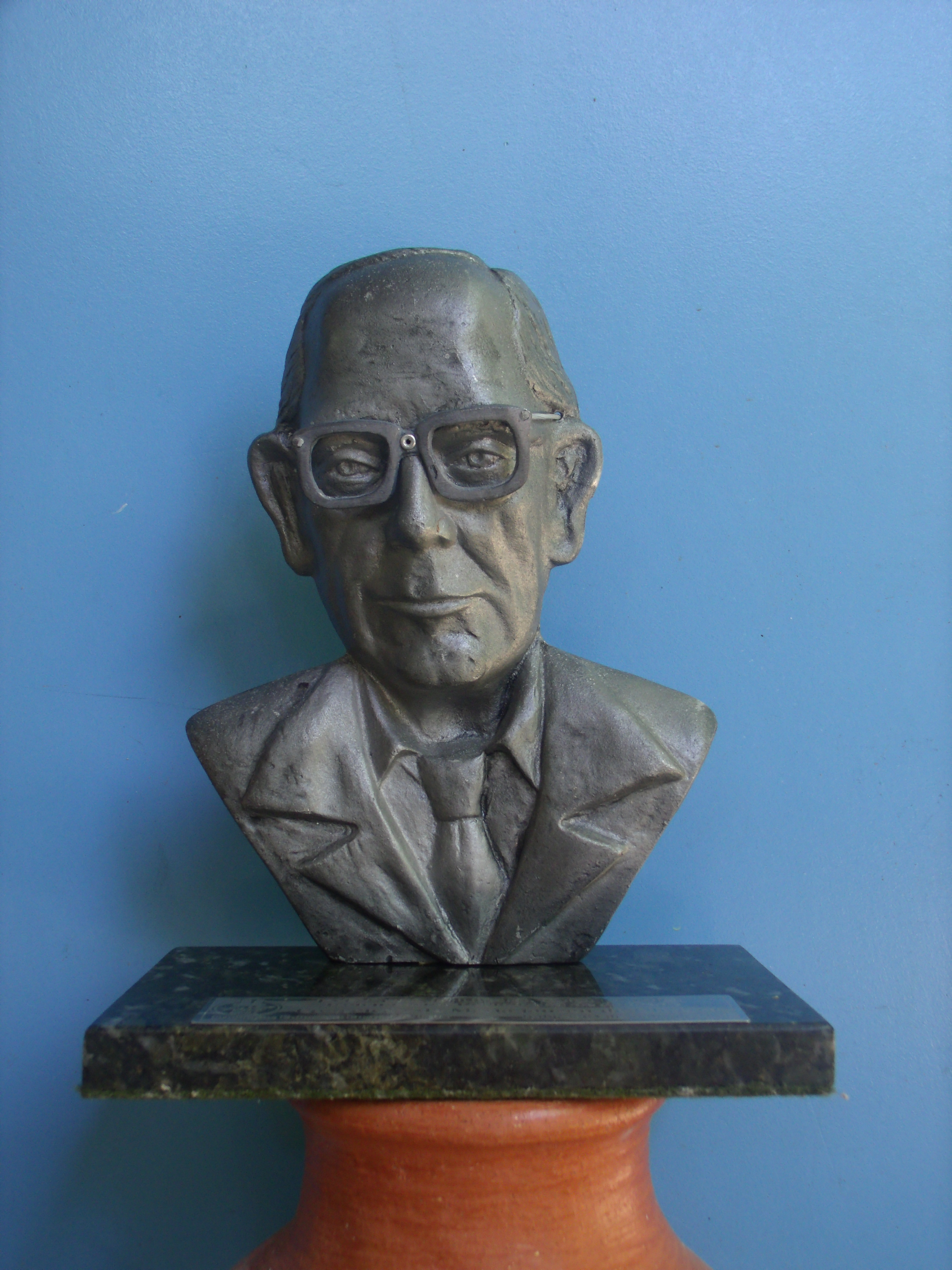 Troféu Carlos Drummond Andrade, distribuído por um colonista social de Itabira, para personalidades de destaque.